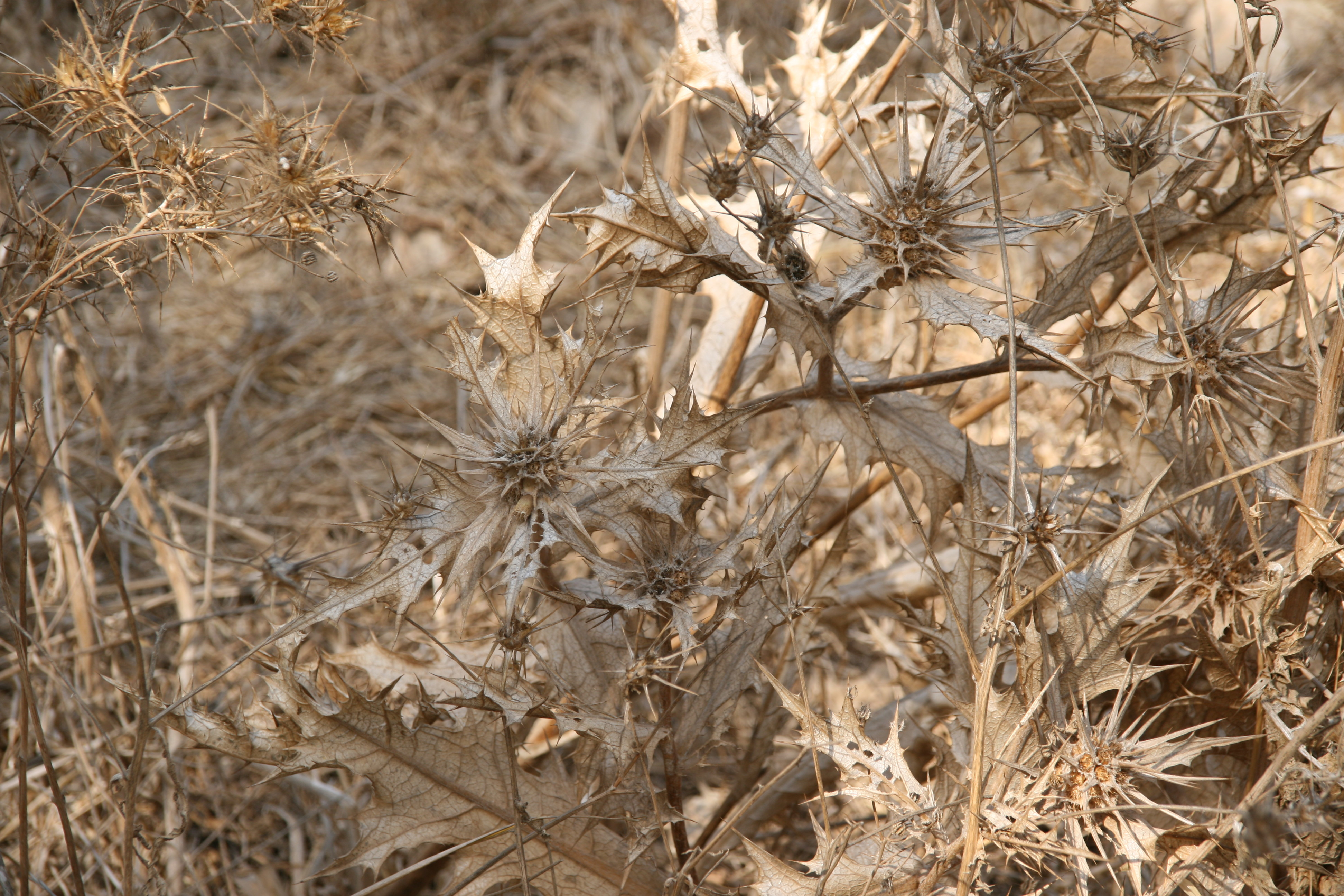 Gundelia_Tournefortii